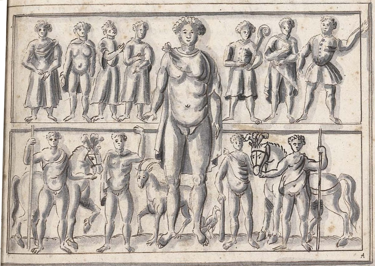 Zwölfgötterrelief, römisches Steindenkmal aus Marbach, Zeichnung von Simon Studion, dem Entdecker des Denkmals, 1597, Landesmuseum Württemberg, Inventarnummer RL401. In der Mitte des Reliefs steht, doppelt so groß wie die elf anderen Götter, der römische Gott Merkur, in dem Simon Studion Bacchus erkennen wollte. Simon Studion: Vera origo illustrissimae et antiquissimae domus Wirtenbergicae. [Marbach am Neckar] 1597, Seite 31.